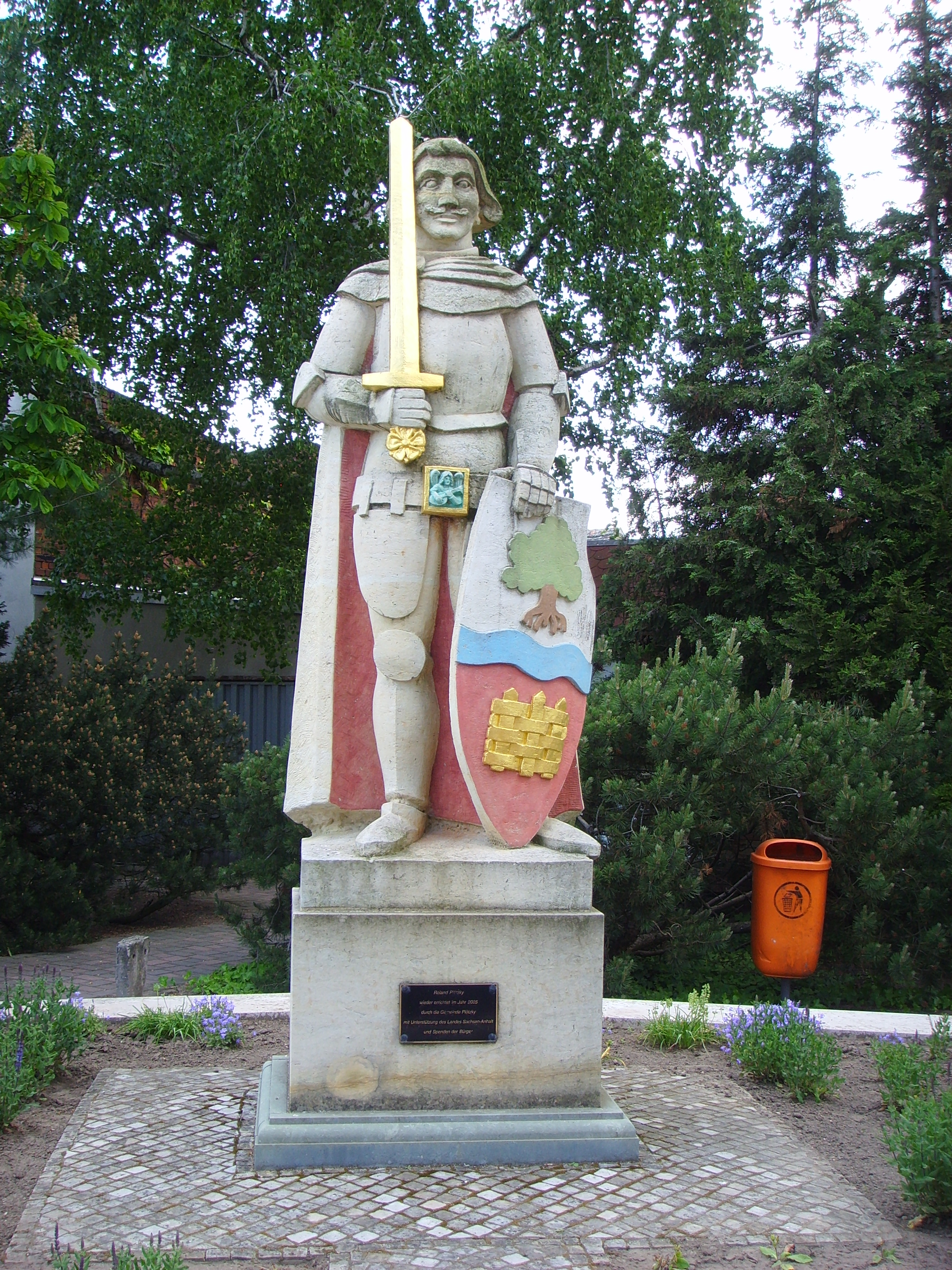 Nachbildung des Roland in Plötzky